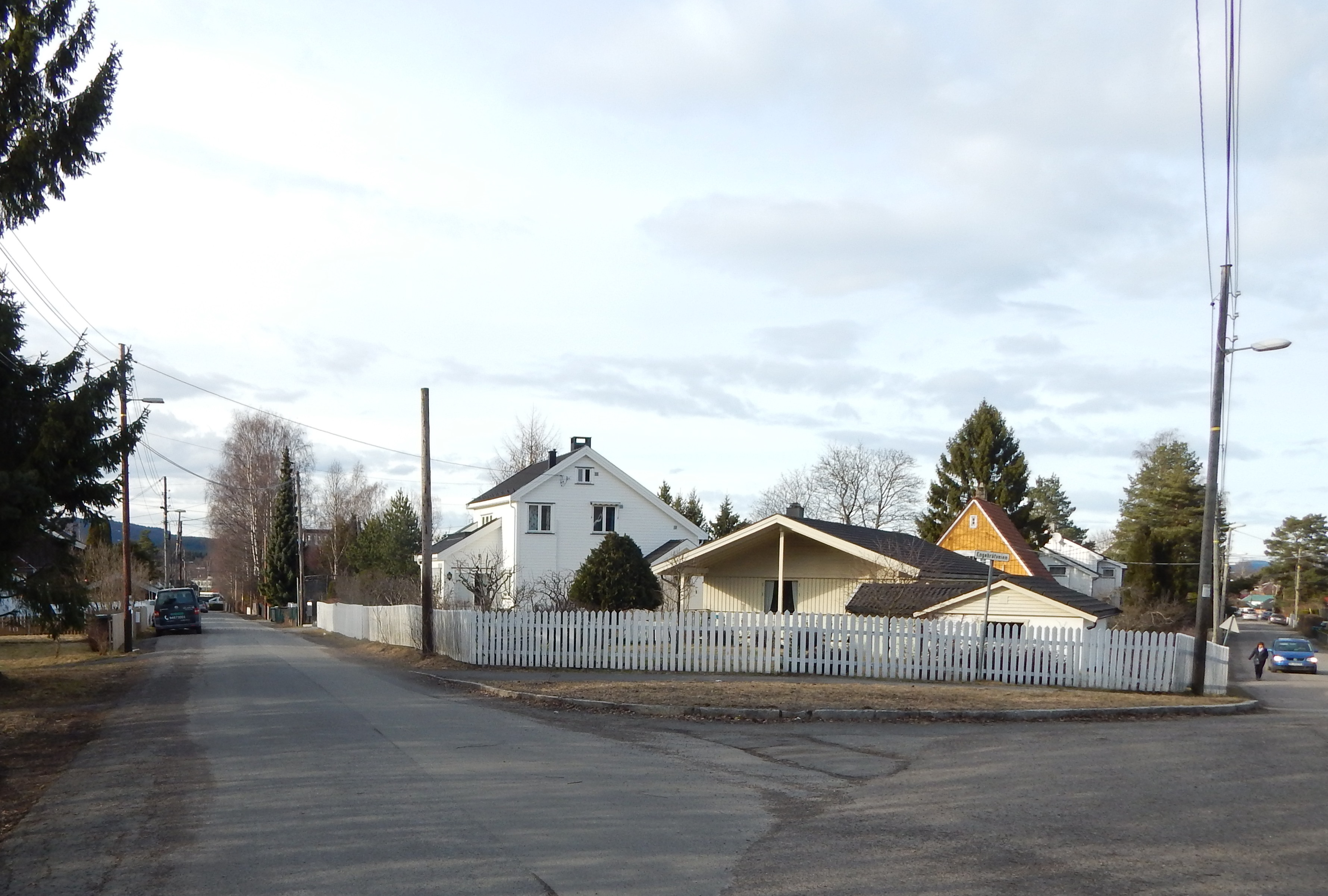 Engebråtveien fra krysset ved Gamle Kjelsåsvei